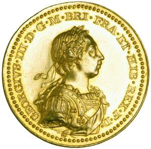 Krönung 1761 Georg III: zum König Englands Avers, Gold